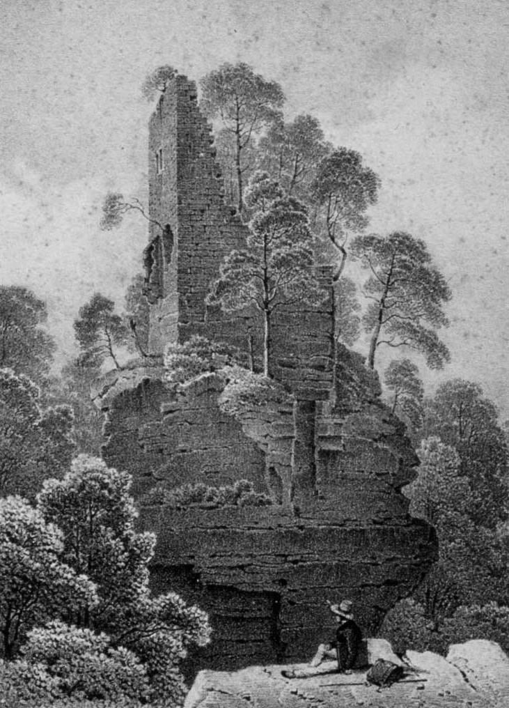 Lithographie der Burgruine Hohenfels bei Dambach